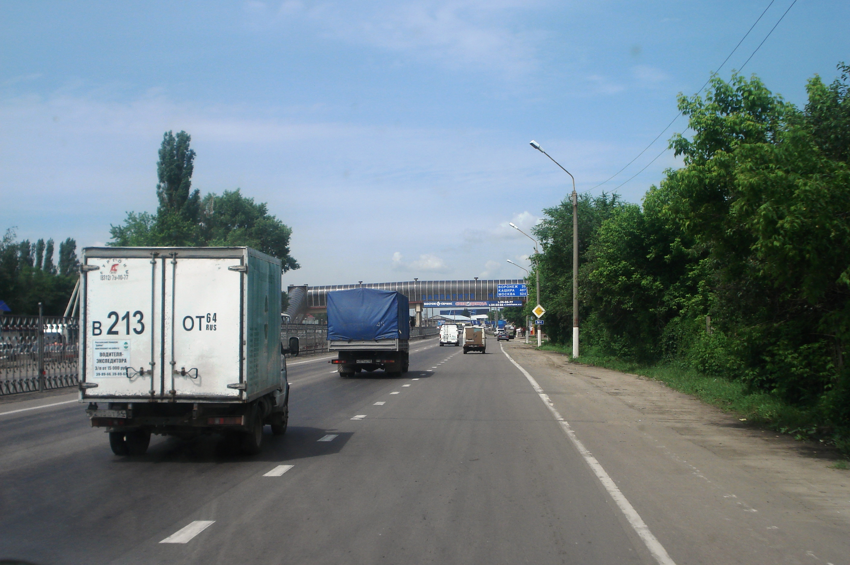 Трасса "Дон" в Новой Усмани